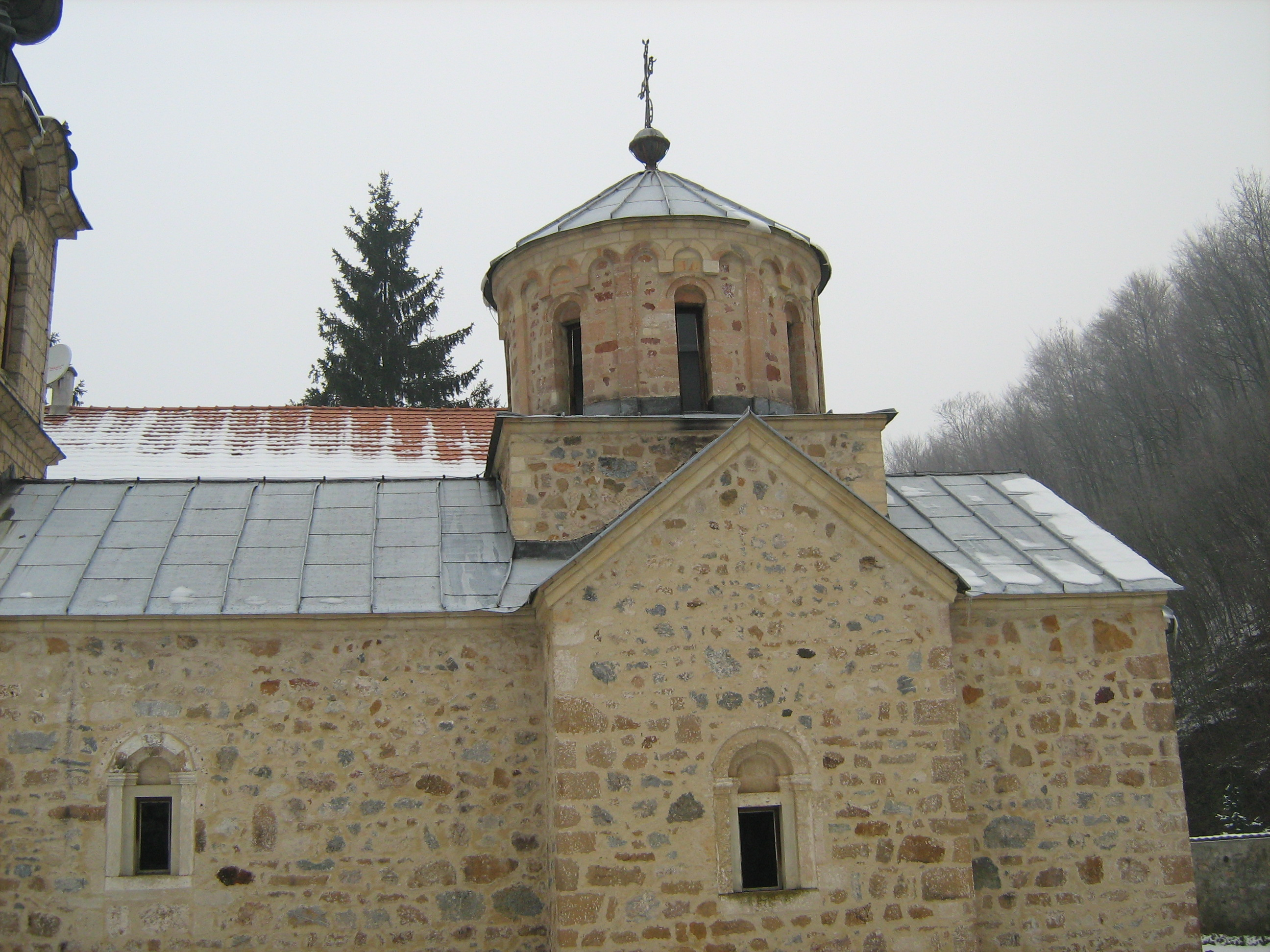 манастир Троноша - црква